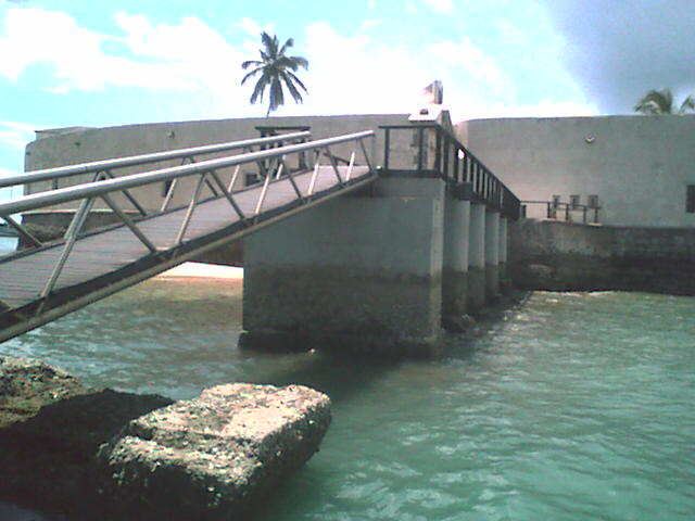 Entrada para o Forte de São Marcelo.